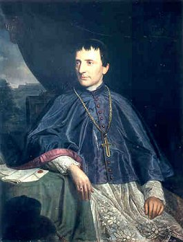 brněnský biskup František Antonín Gindl